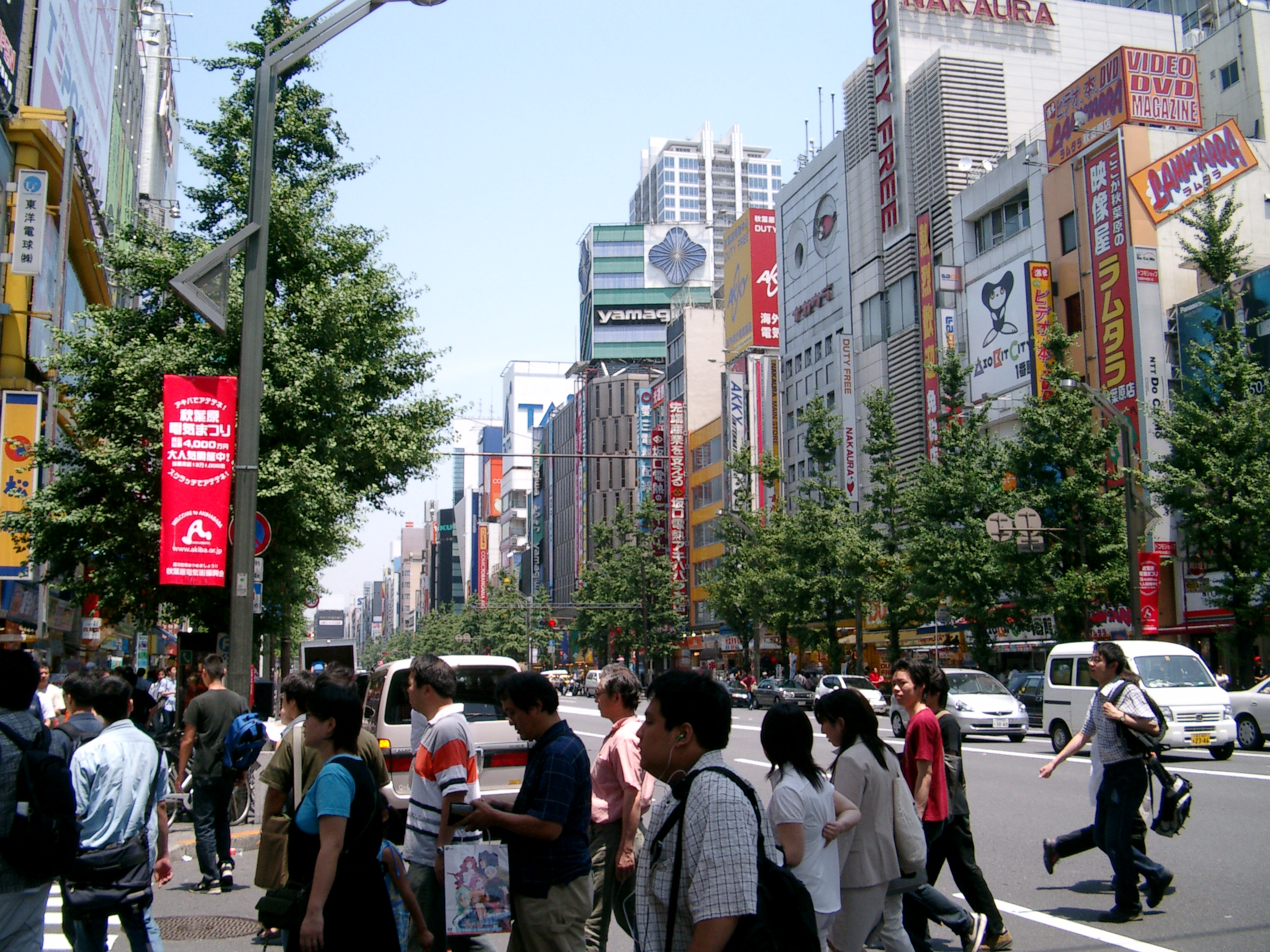 Akihabara das Elektronik Viertel von Tokyo